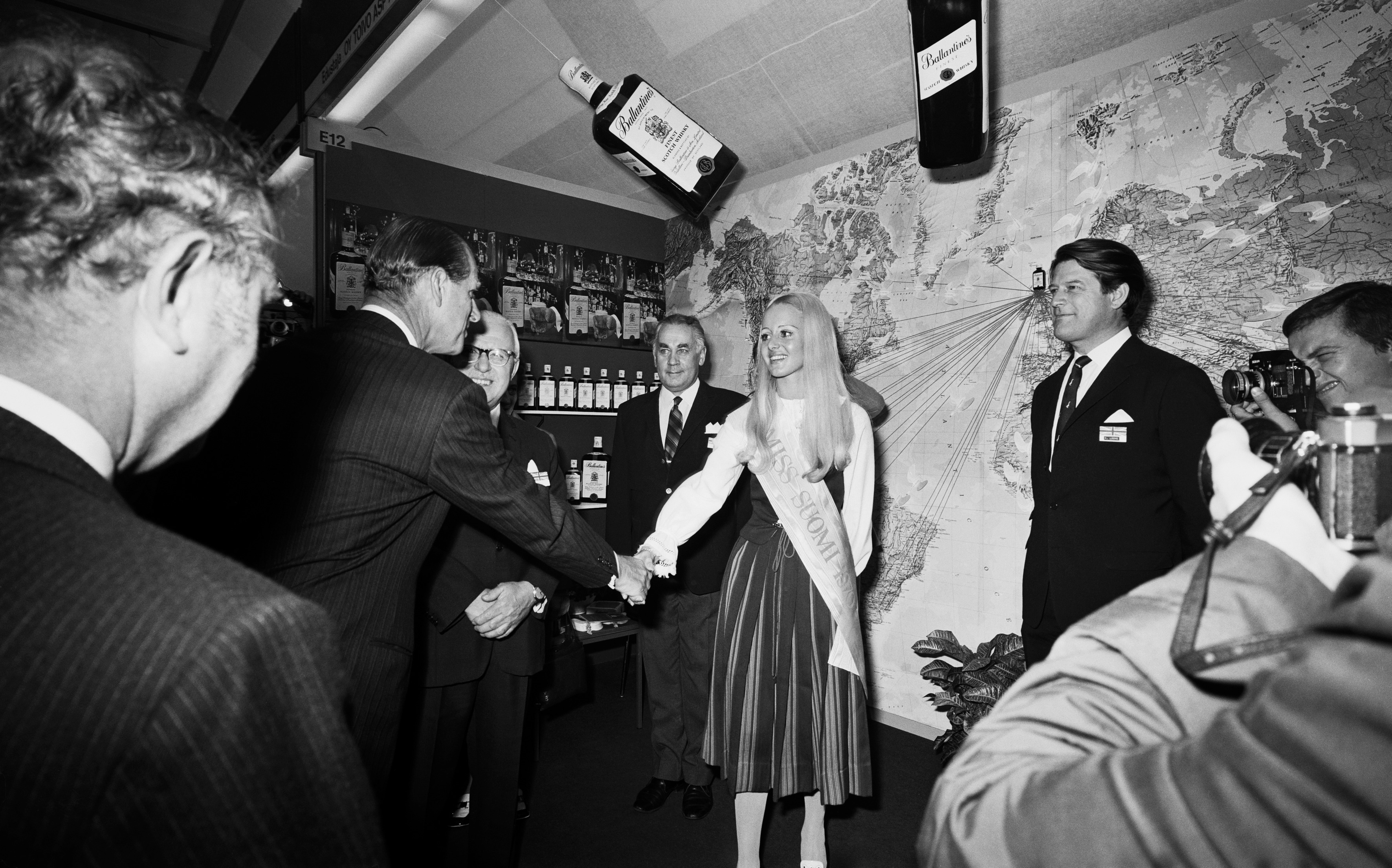 Edinburghin herttua prinssi Philip tervehtii silloista miss Suomea Ursula Rainiota Helsingin kansainvälisillä messuilla 1970.